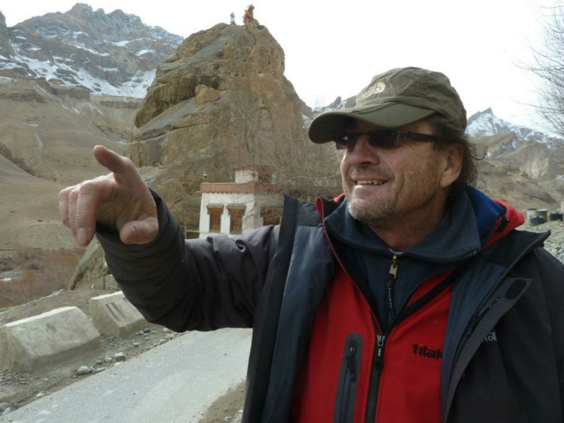 Steve Lichtag v Tibetu